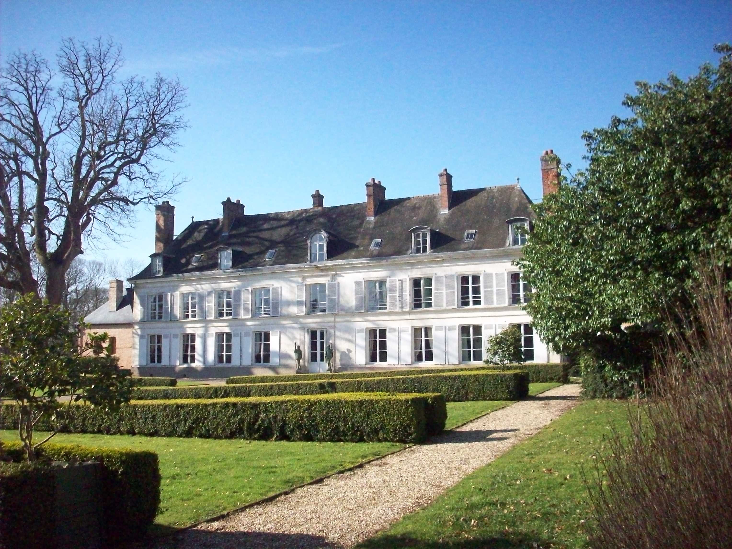 Château de Vandrimare.